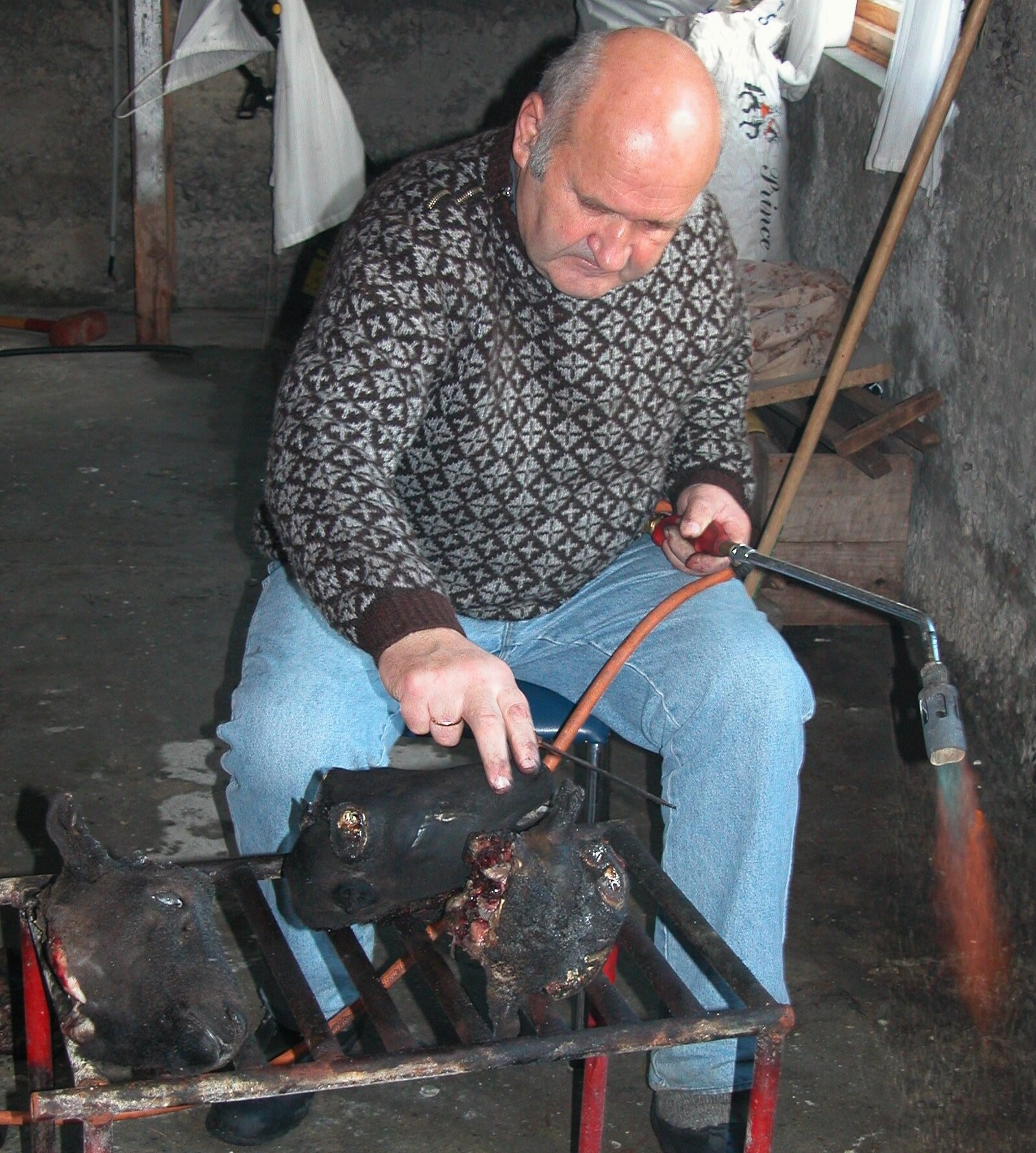 Auf den Färöern ist Schafskopf eine Delikatesse. Nach der Schlachtung wird das Fell vom Kopf abgebrannt. Foto: Erik Christensen, Porkeri (Website)